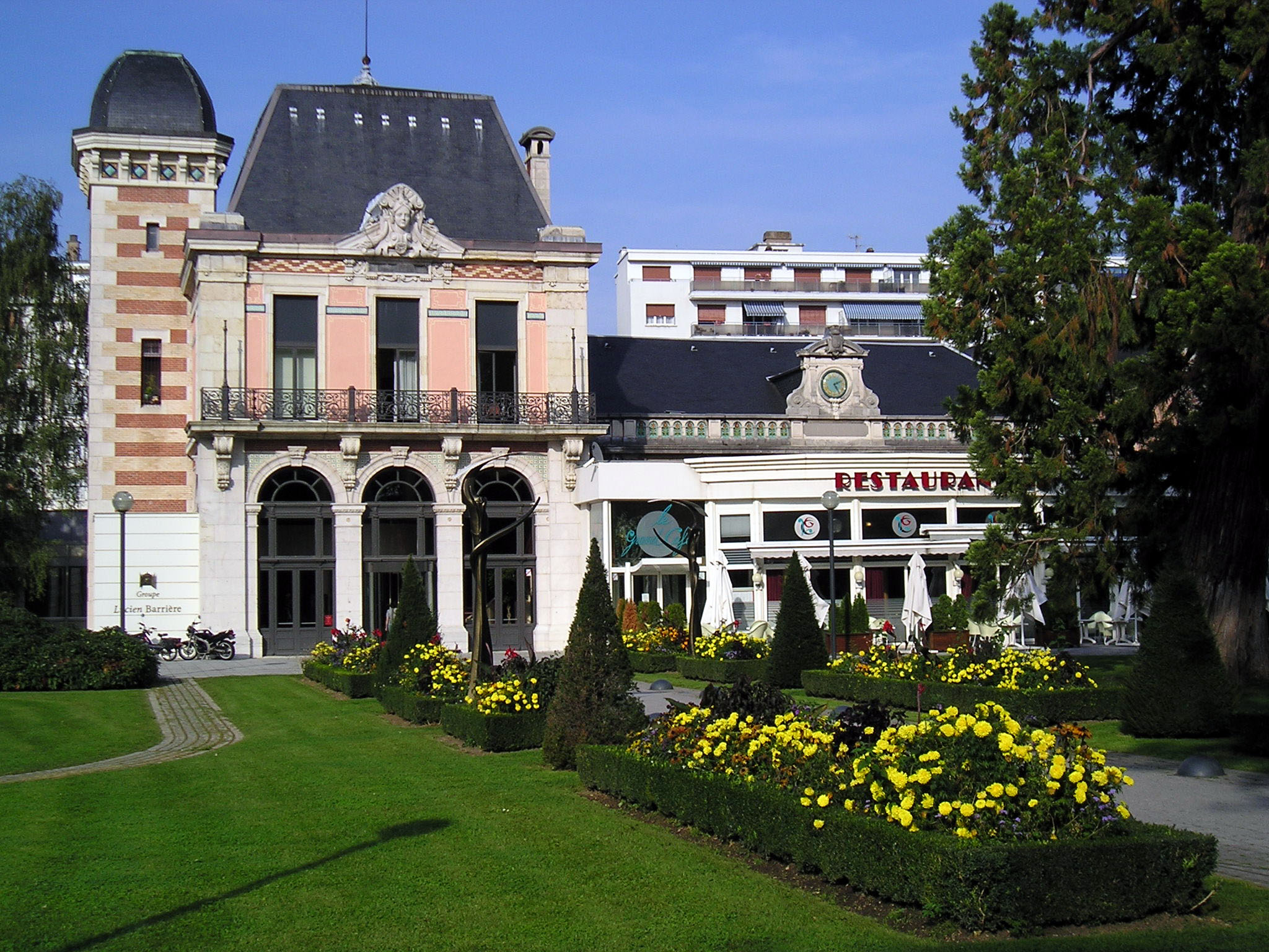 Casino de l'ancienne ville thermale de Besançon-les-Bains